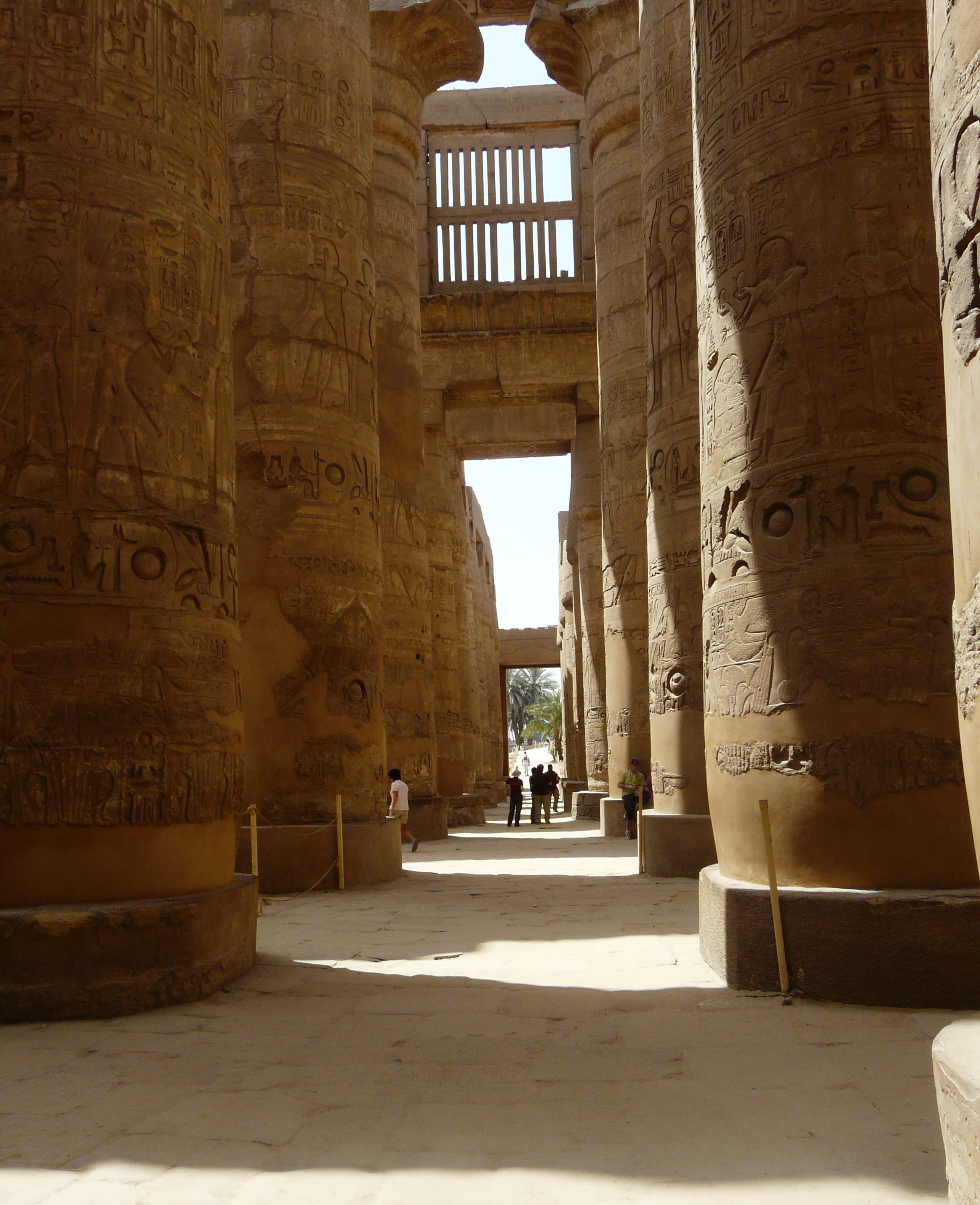 Karnak - Salle hypostyle